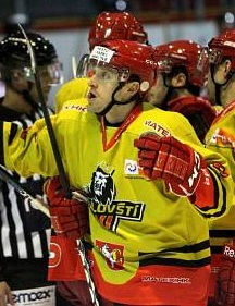 Zdeněk Čáp